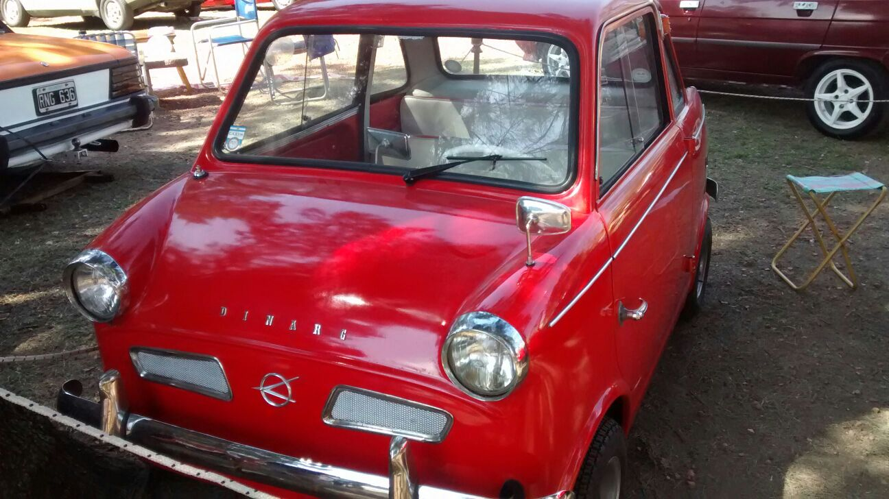 Dinarg D-200 fotografiado en una expo en Rosario